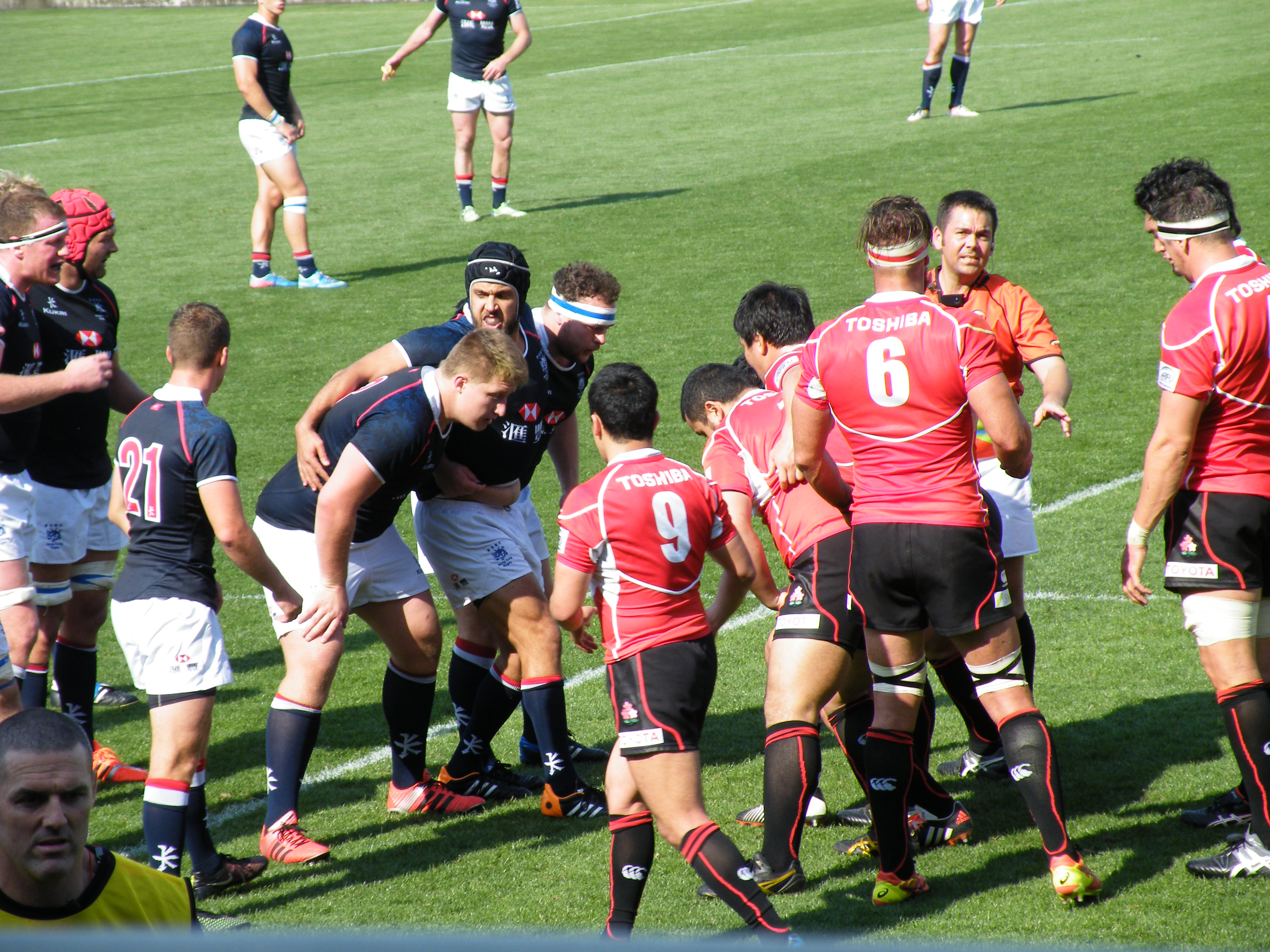 アジアラグビーチャンピオンシップ2015 日本対香港（東京・秩父宮ラグビー場）。